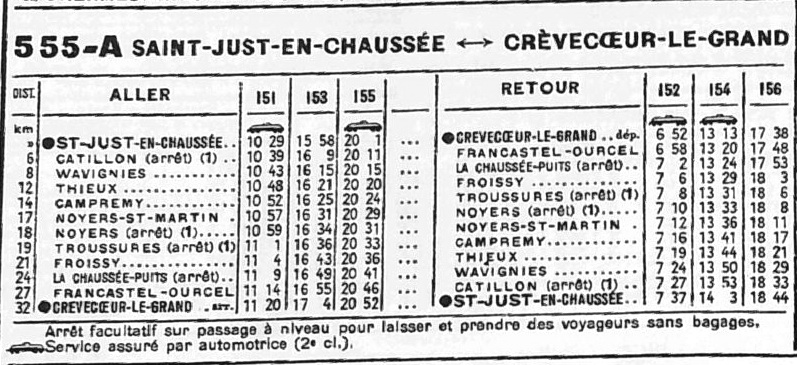 Horaires de la ligne Saint-Just - Crèvecoeur-le-Grand